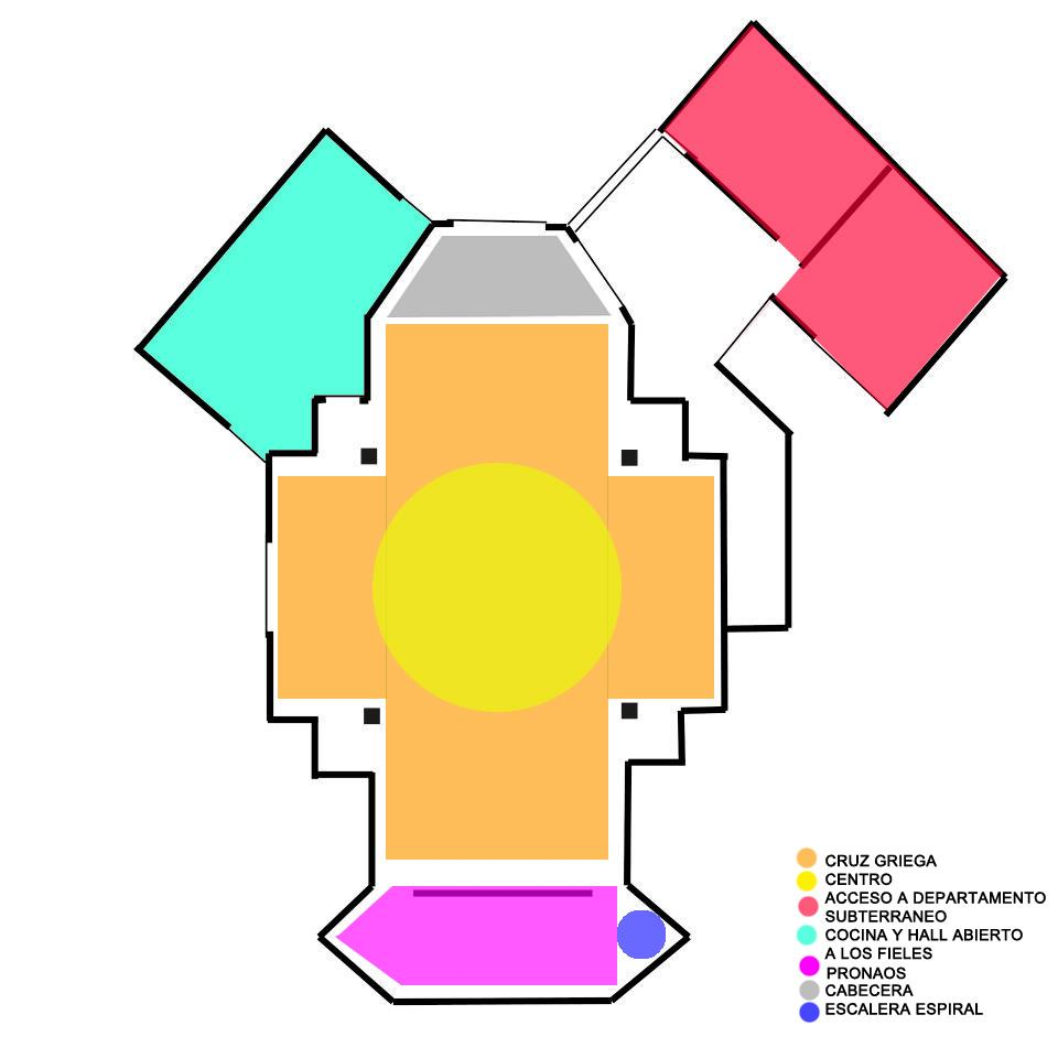 planta esquematica iglesia